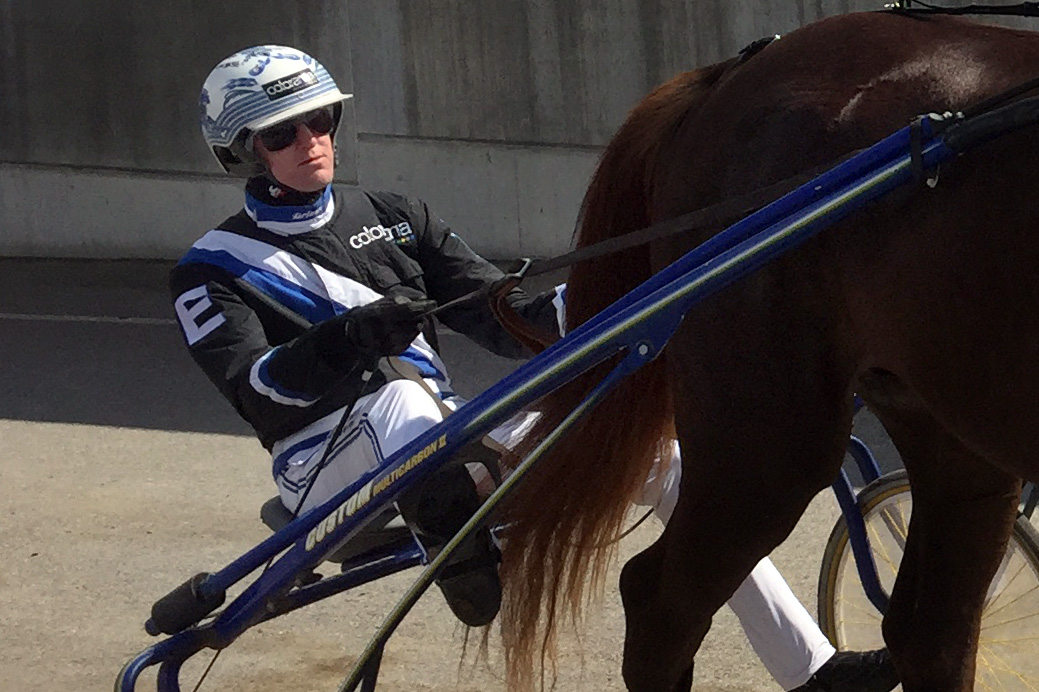 Christoffer Eriksson på väg ut på banan under Olympiatravet 2017